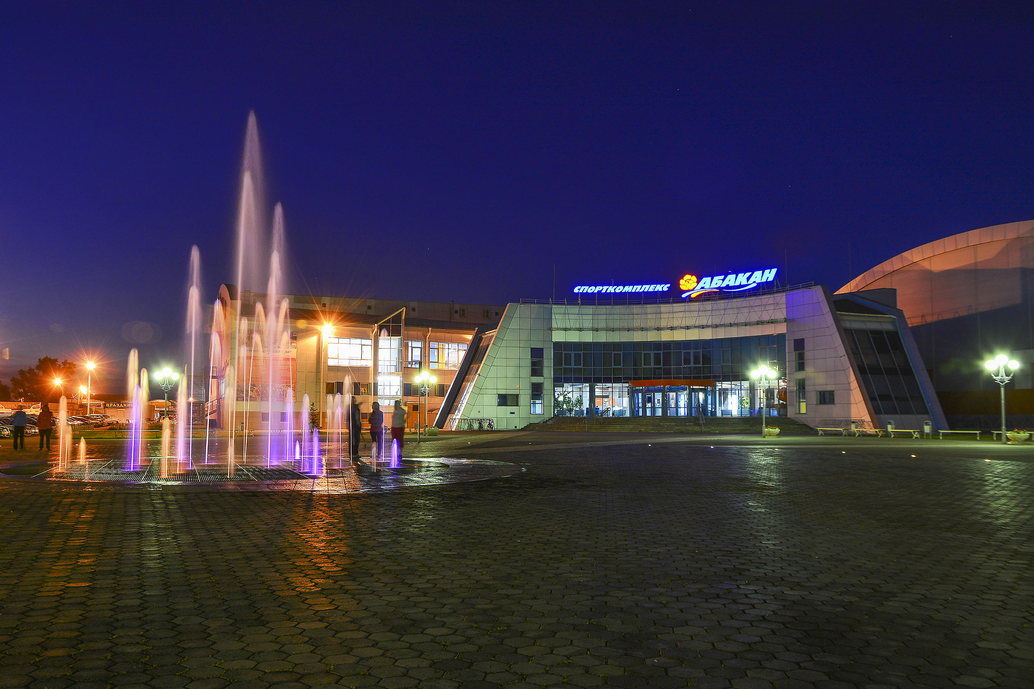 500px provided description: ???? ?????? ?????????? ????? ?????? ? ??????????? ???? ???????? ? ?????? ? ?????? ??????? ?? ??????? ????? ?????????? ??????????, ????? ?????? ????? ??????? ???????? ??? ? ?????? ??? ? ? ???????? ???, ???????? ????? ?????????. [#????? ,#???? ,#????? ,#??????? ,#???? ,#?????? ,#?????? ,#????????? ,#?????? ,#????? ,#???????? ,#?????????????]